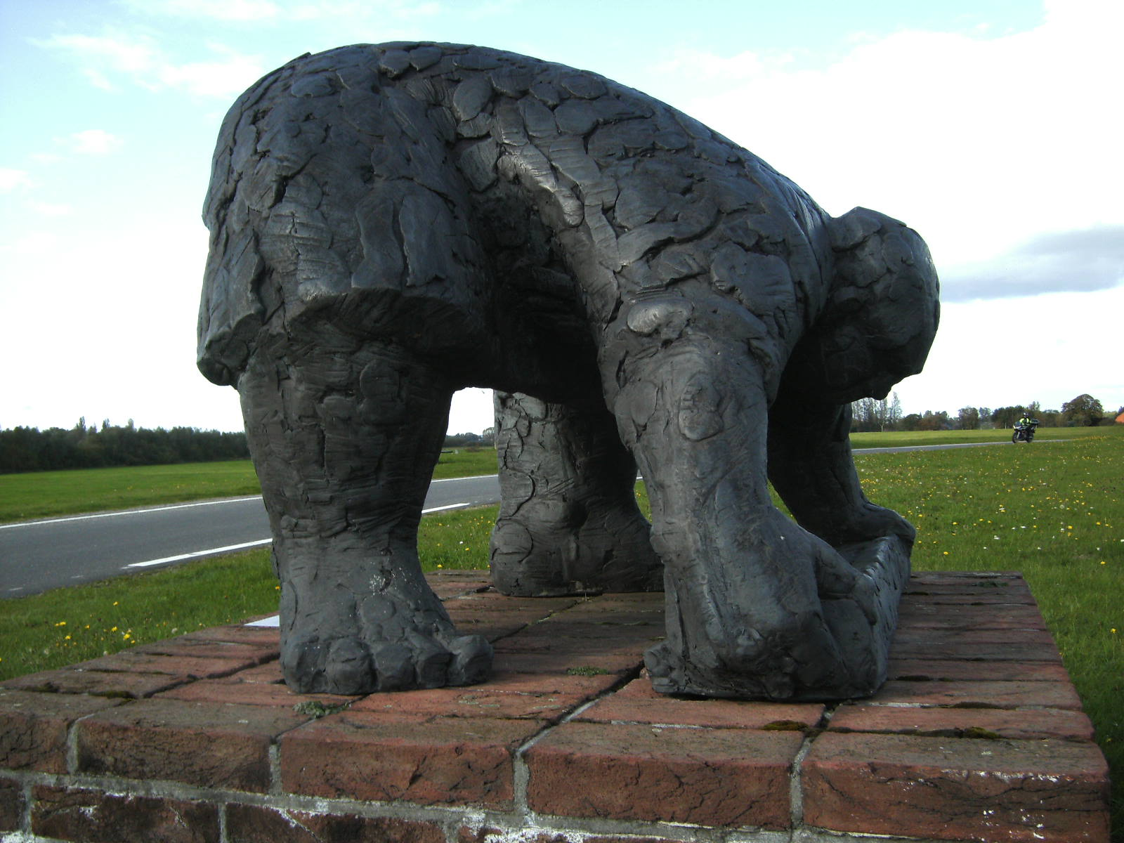 Beeld van een Neerslager (baksteenvormer) op de IJsseldijk bij Den Nul langs de weg tussen Zwolle en Deventer. Gemaakt door Theo Schreurs (1939) in opdracht van de firma Aberson uit Olst waarover wordt gezegd dat deze als eerste in Europa dit zware werk met behulp van een machine liet uitvoeren.